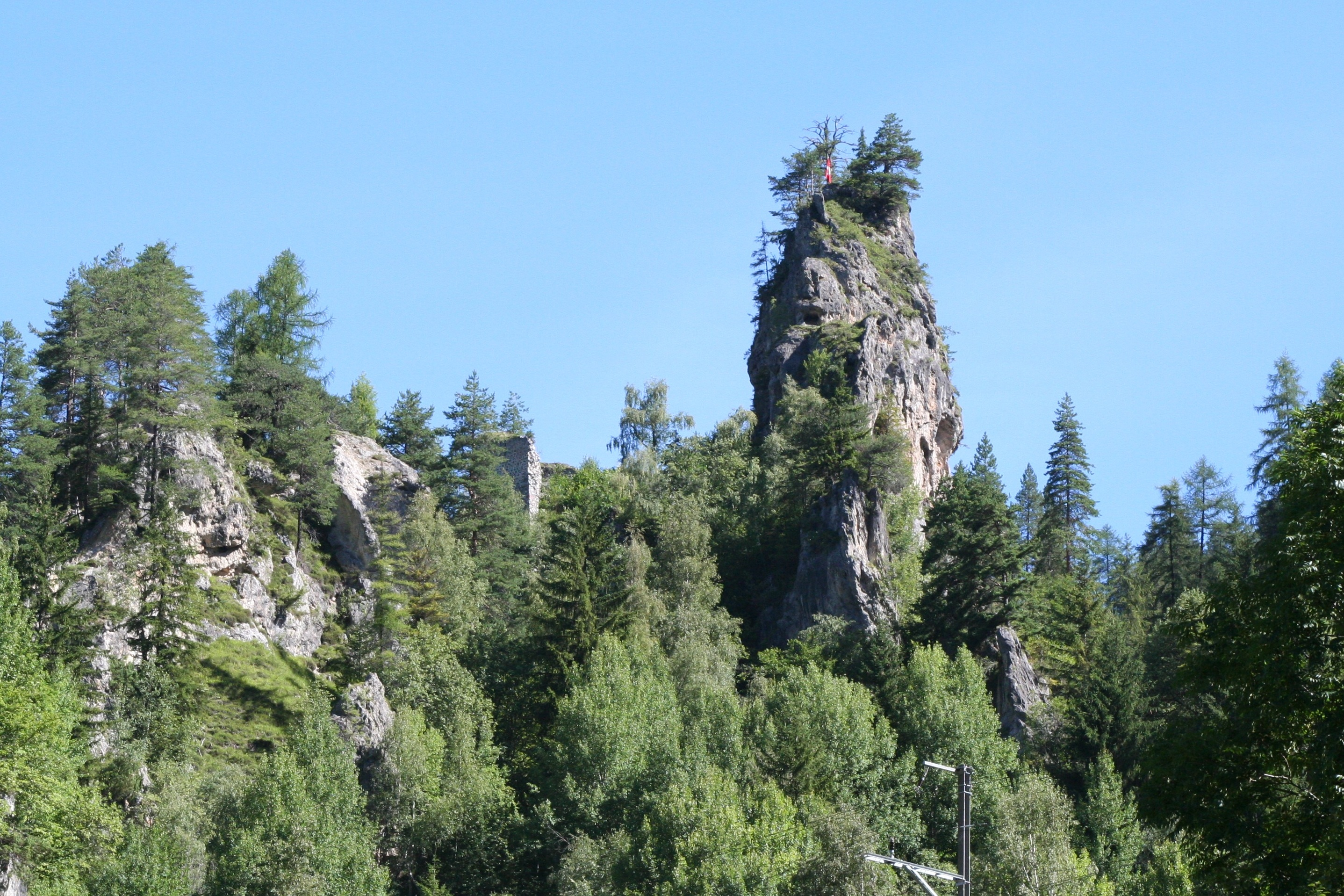 Lage der Ruine